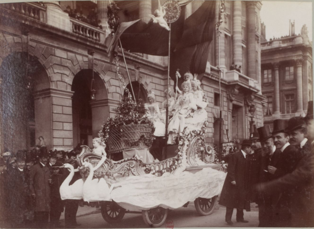 Le char automobile électrique de la Reine des Reines de la rive droite Marie Missiaux devant le siège de l'Automobile club de France place de la Concorde.